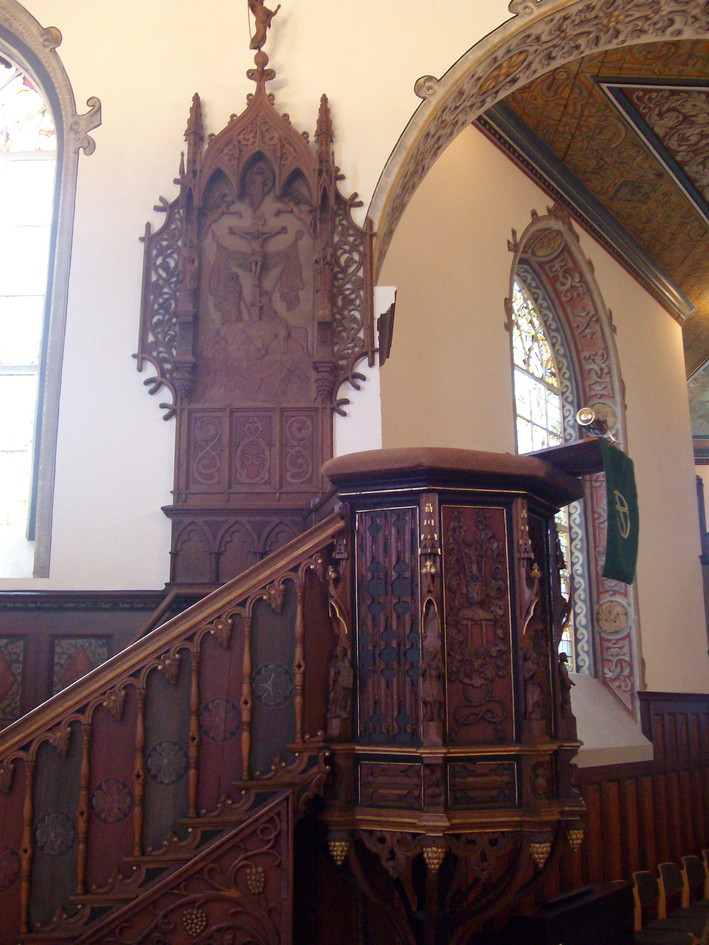 Kanzel in der Lutherkirche in Leer, Ostfriesland